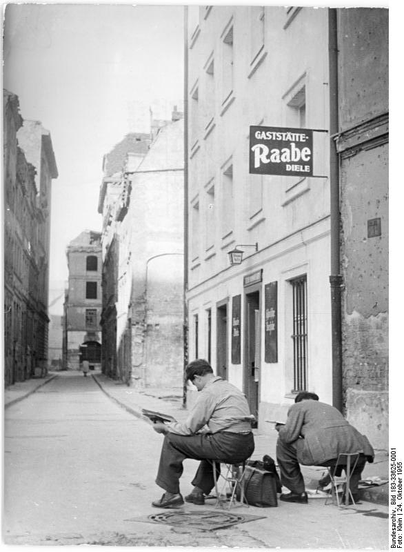 Berlin, Sperlingsgasse, Gaststätte "Raabe-Diele" Zentralbild Klein Bn-Ku. 2 Motive 24.10.1955 Alt-Berlin Ein Stück Alt-Berlin ist die Sperlingsgasse, die durch Wilhelm Raabe's "Chronik der Sperlingsgasse" berühmt wurde. Das Haus, in dem Frau Konarske, von den Berlinern "Joldelse" genannt, die Raabe Diele als Wirtin betreut, ist mit Unterstützung des nationalen Aufbauwerkes renoviert worden. UBz: Raabe Diele und Blick in die Sperlingsgasse.